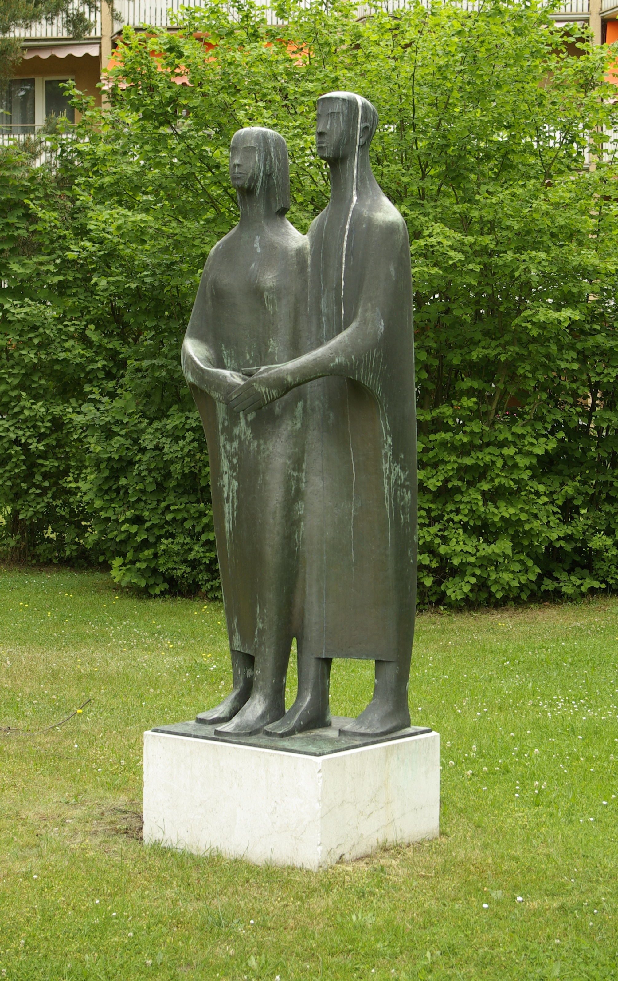 Menschenpaar (1962) von Joachim Berthold in der Gebbertstraße, Ecke Breslauer Straße in Erlangen